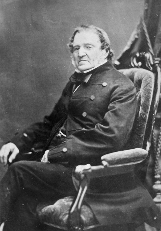 Hon. Frederic-Auguste Quesnel, Montréal, Québec, Canada - photographie peinte, copie réalisée en 1867 William Notman (1826-1891), Sels d'argent sur papier monté sur papier - Papier albuminé, 8.5 x 5.6 cm